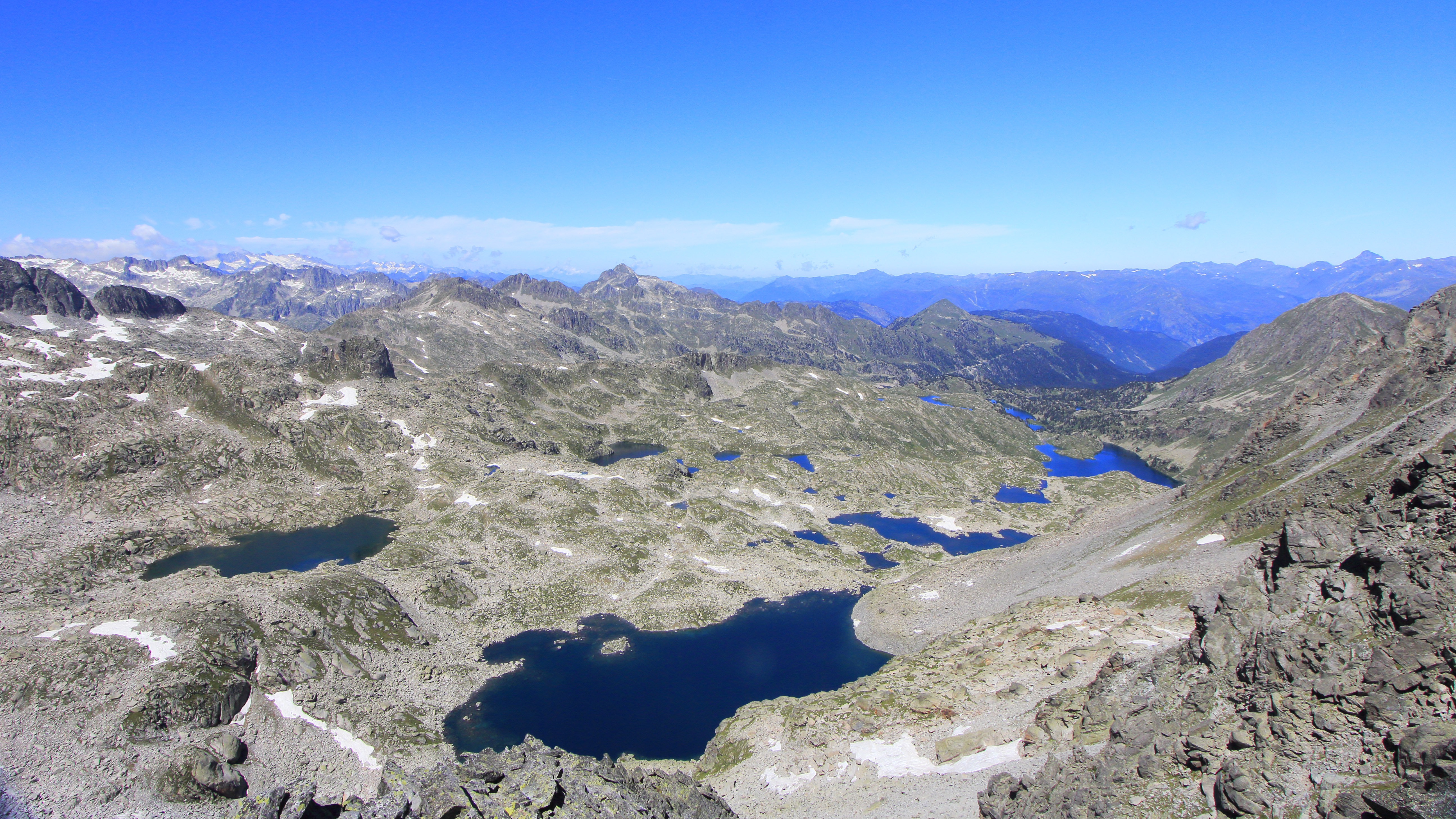 Circ de Colomèrs des del Pic de Bergús; estanys de Cap de Colomèrs, de Ratera de Colomèrs i estany Obago